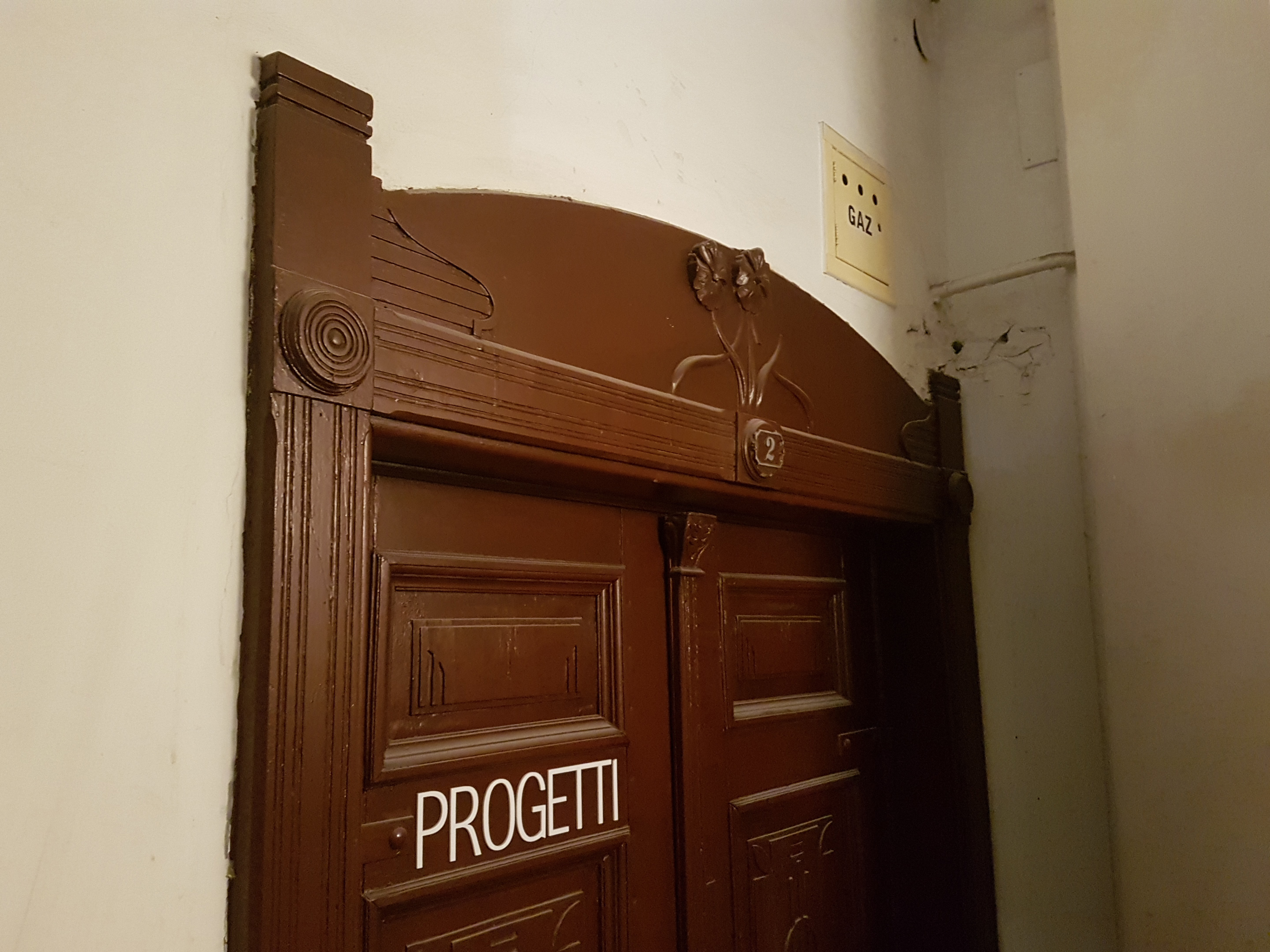 Marszałkowska 4 lokal 2 (2018)